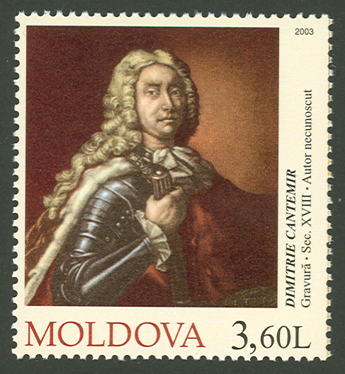 Marcă poştală